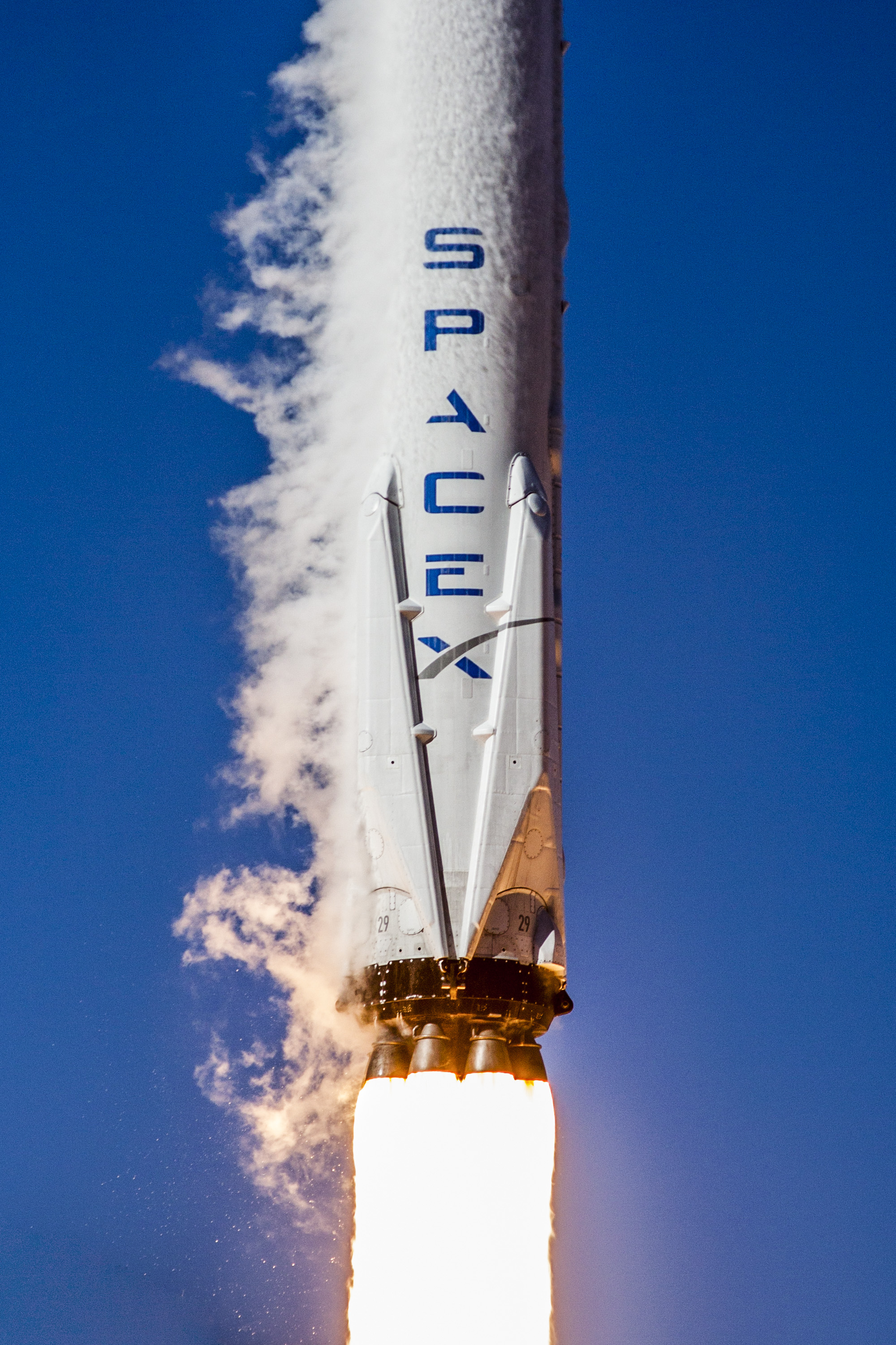 Iridium-1 Launch